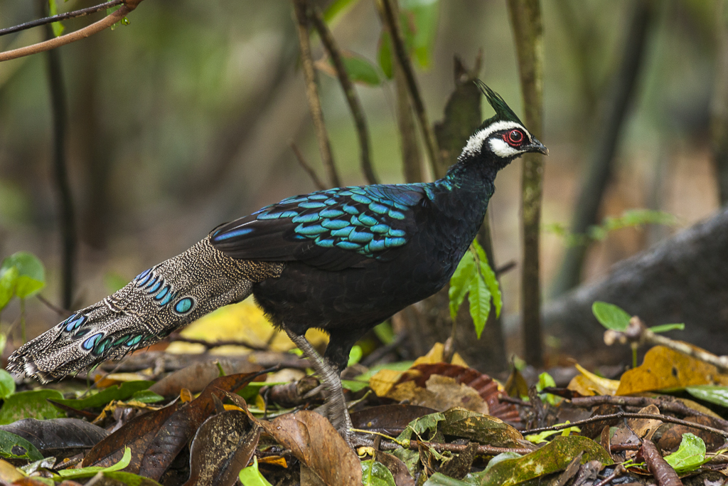 Palawan Peacock-Pheasant - Palawan - Philippines_H8O0751